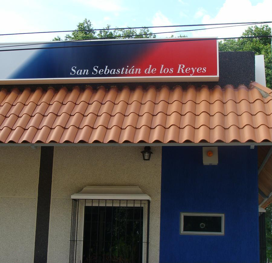 San Sebastián de Los Reyes, Venezuela. Letrero de una agencia bancaria en la Plaza Bolívar.